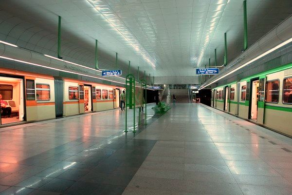 метростанция "Западен парк"